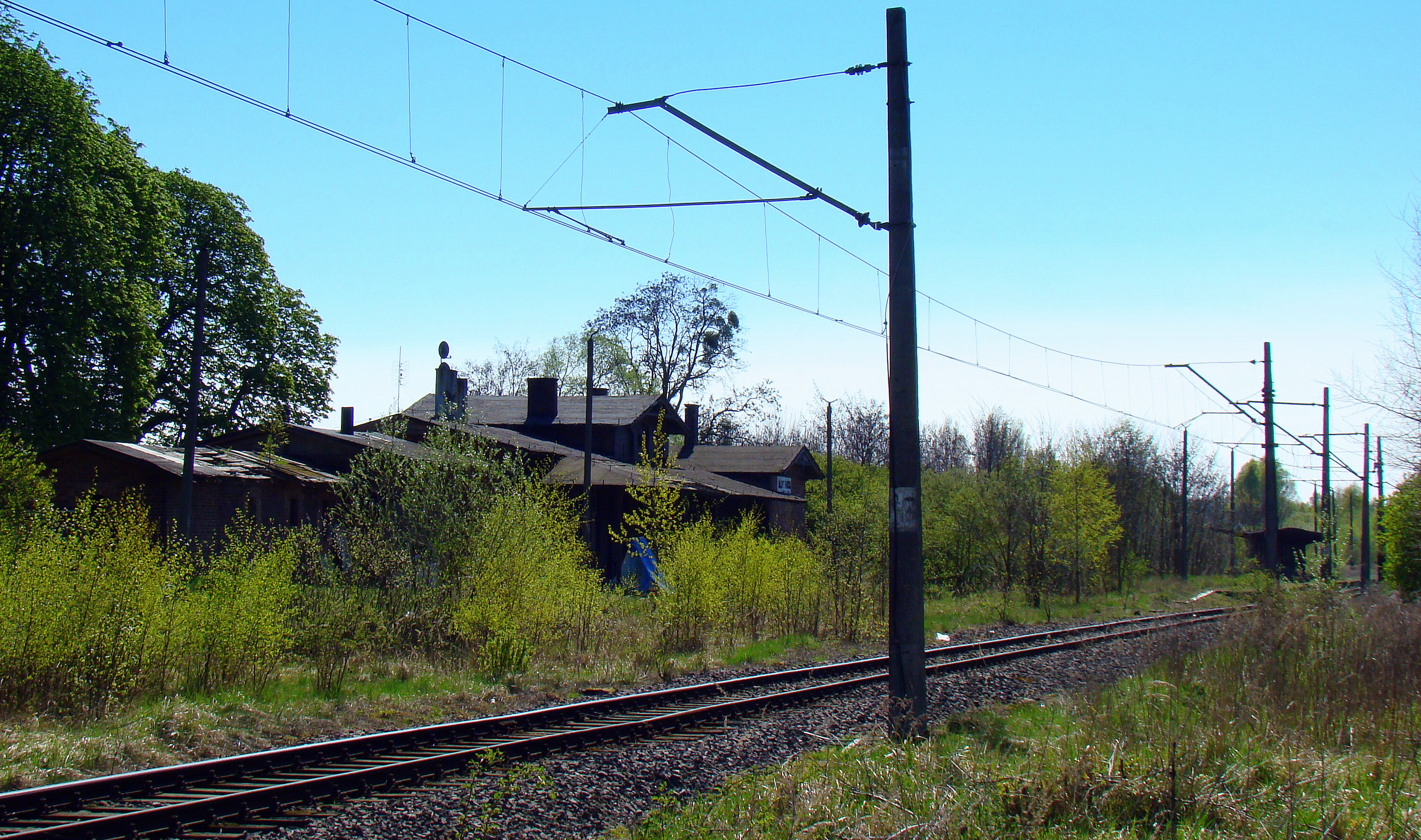 Jasienica, przystanek kolejowy (nieczynny), Police, Polska